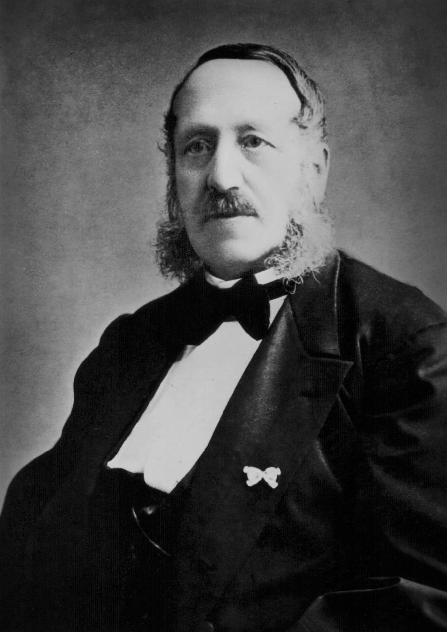 Moritz Gottgetreu portret